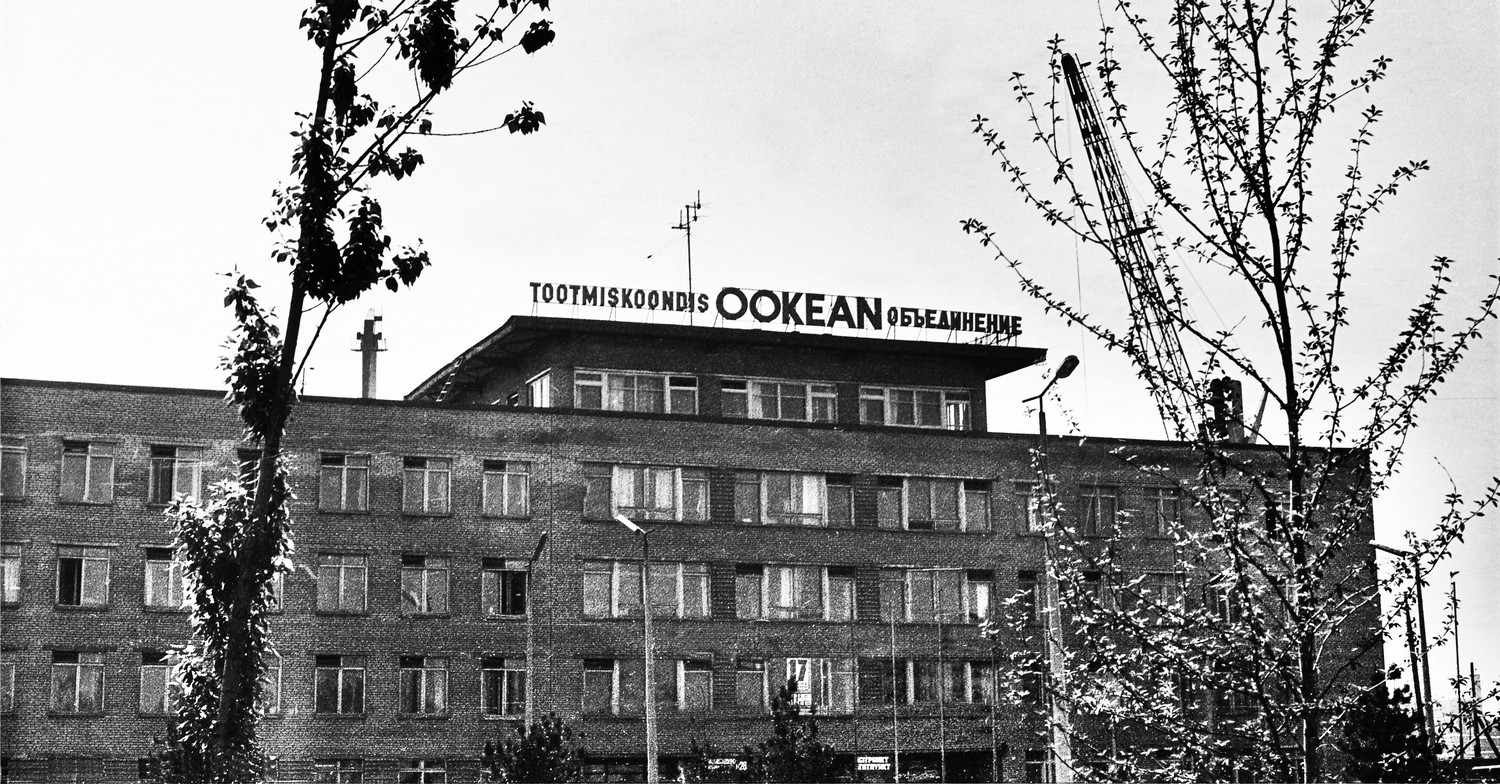 Eesti Kalatööstuse Tootmiskoondis Ookean peahoone. Paljassaare sadam 73